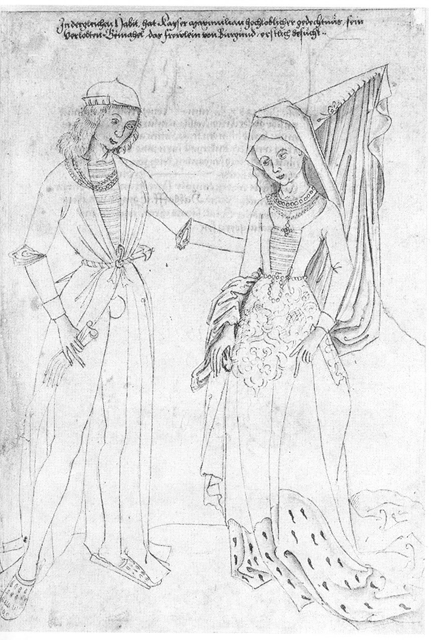 Maximilian I. und Maria on Burgund anonyme Zeichnung